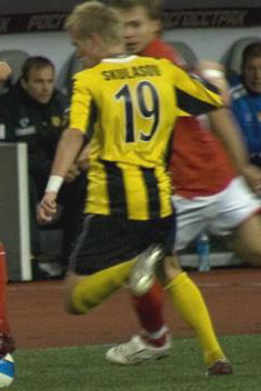 Ari Freyr Skúlason